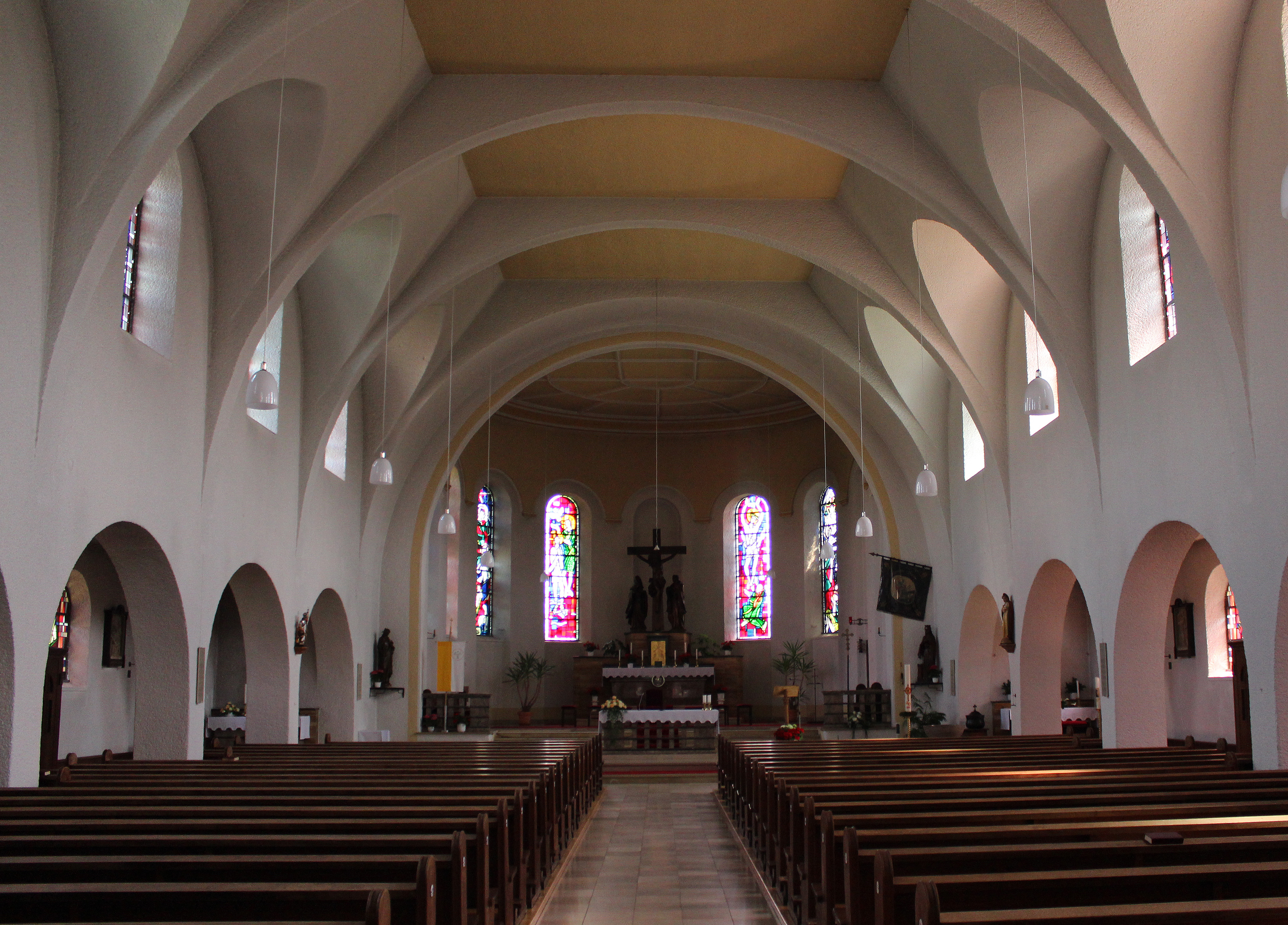 Blick ins Innere der katholischen Pfarrkirche St. Matthias in Altforweiler, einem Ortsteil der Gemeinde Überherrn, Landkreis Saarlouis, Saarland